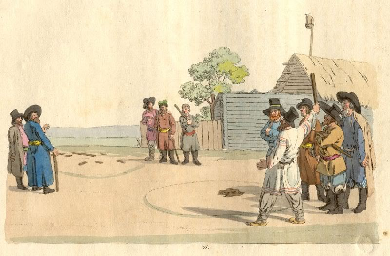 Городки